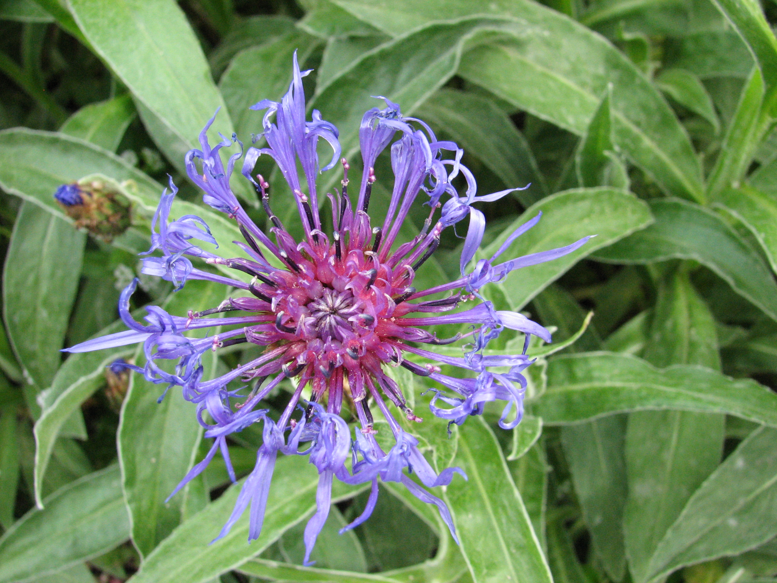 Berg-Flockenblume zwischen Neckar und Katzenbuckel